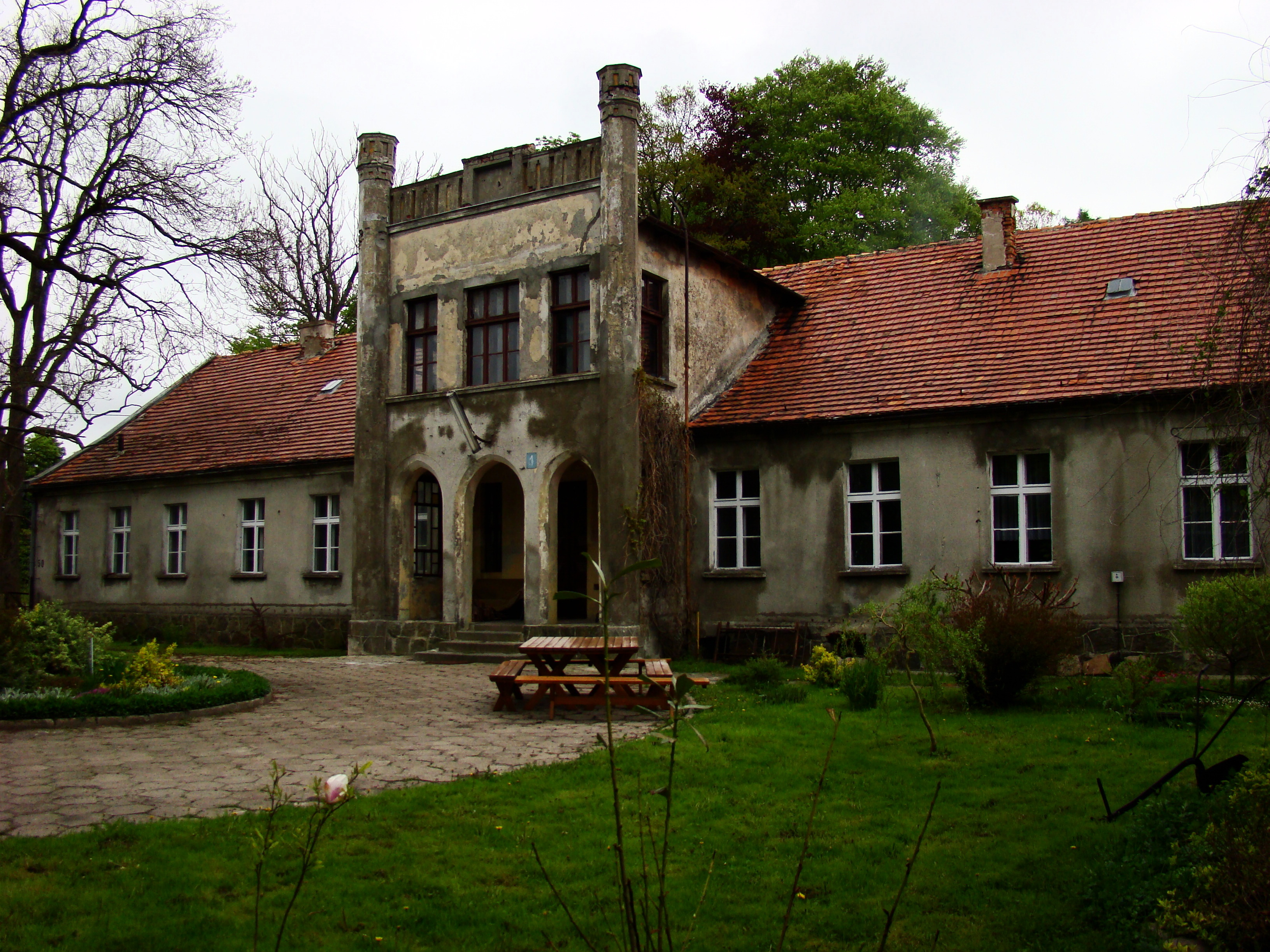 Neoklasyczny dwór z XIX w. Pustarach.